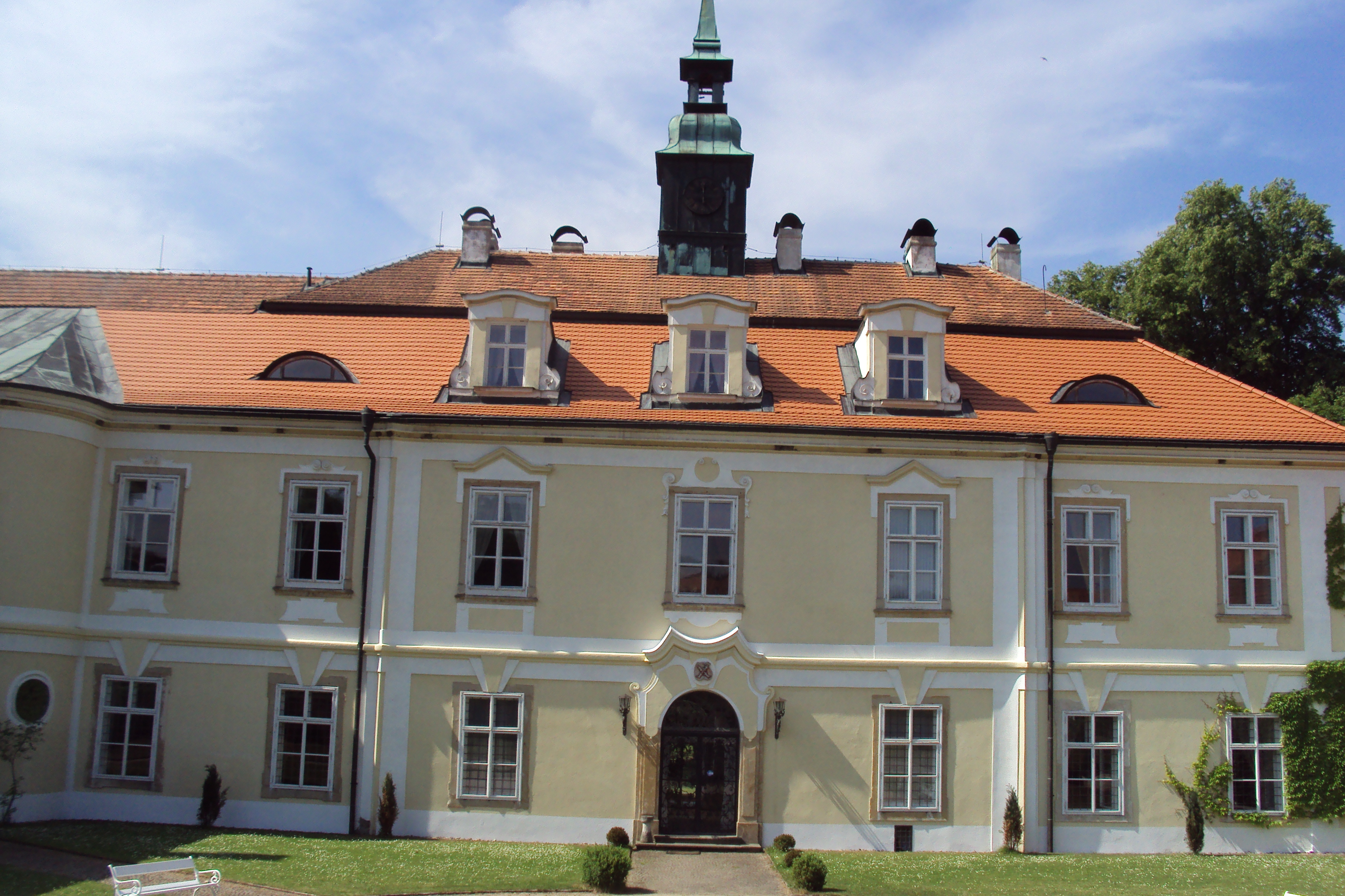 Zámek je ve stejnojmenné osadě u města Dubá